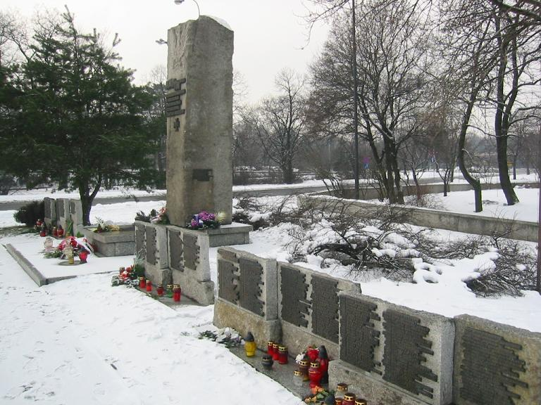 Pomnik katyński w Łodzi